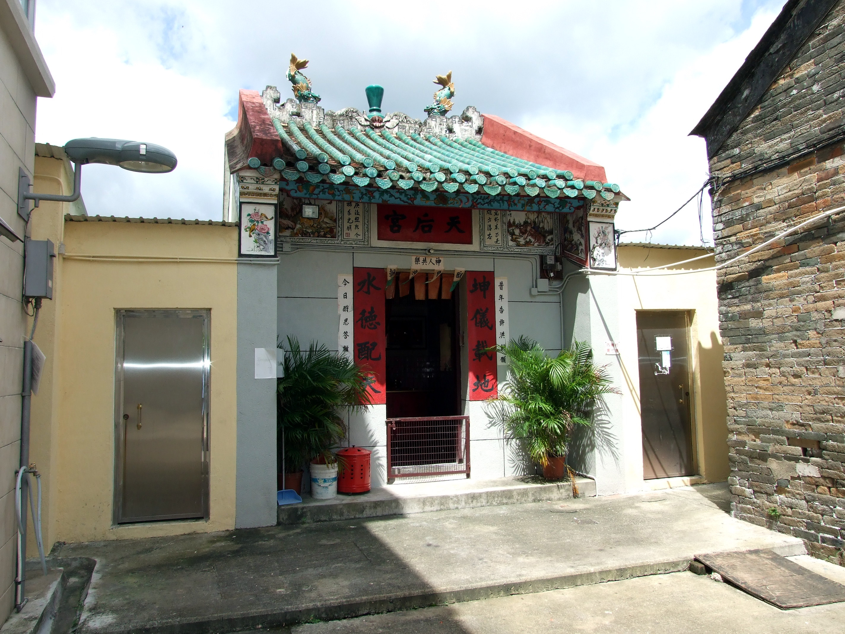 中文（香港）: 丙崗村天后宮